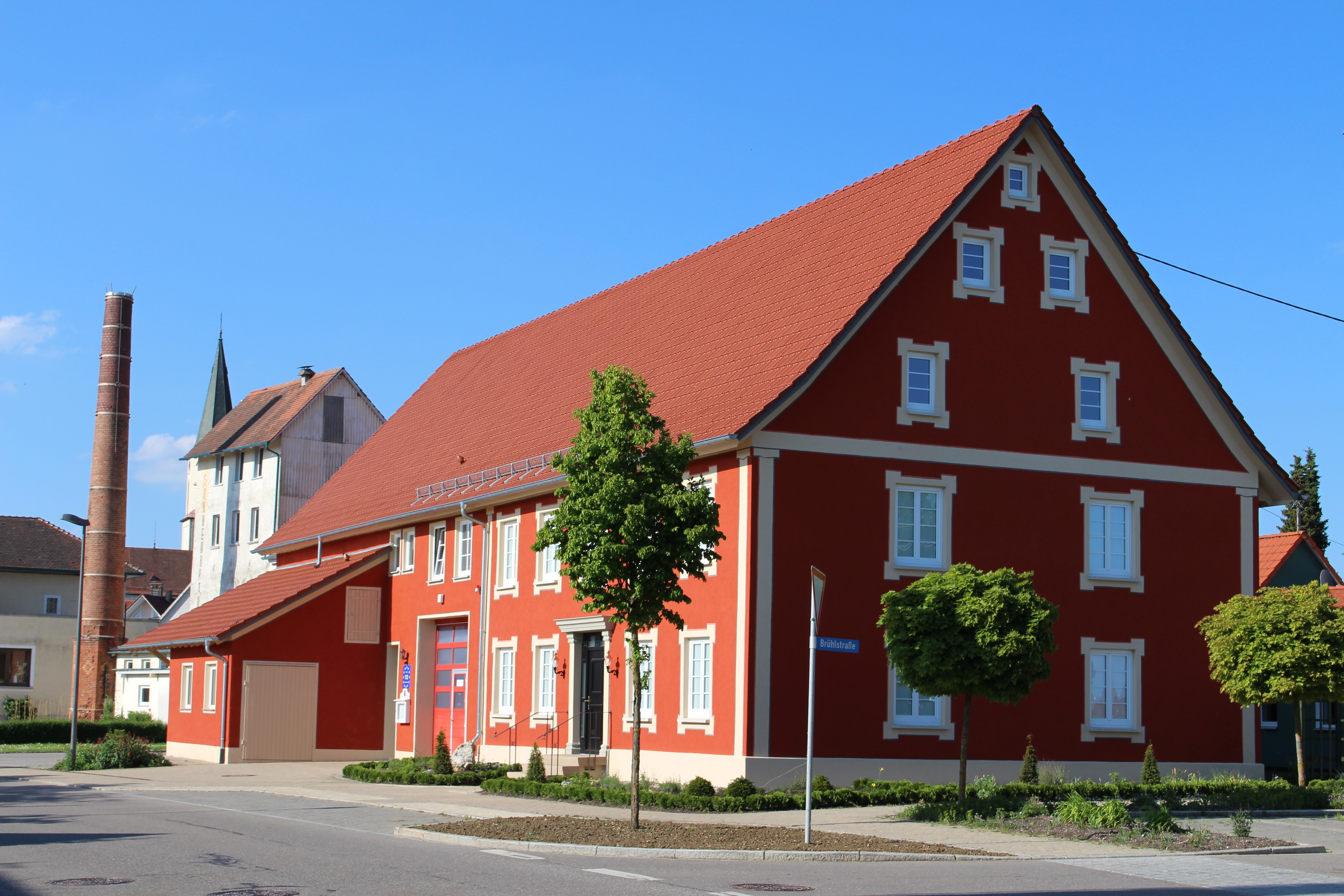 Gewandhaus Museum Inneringen